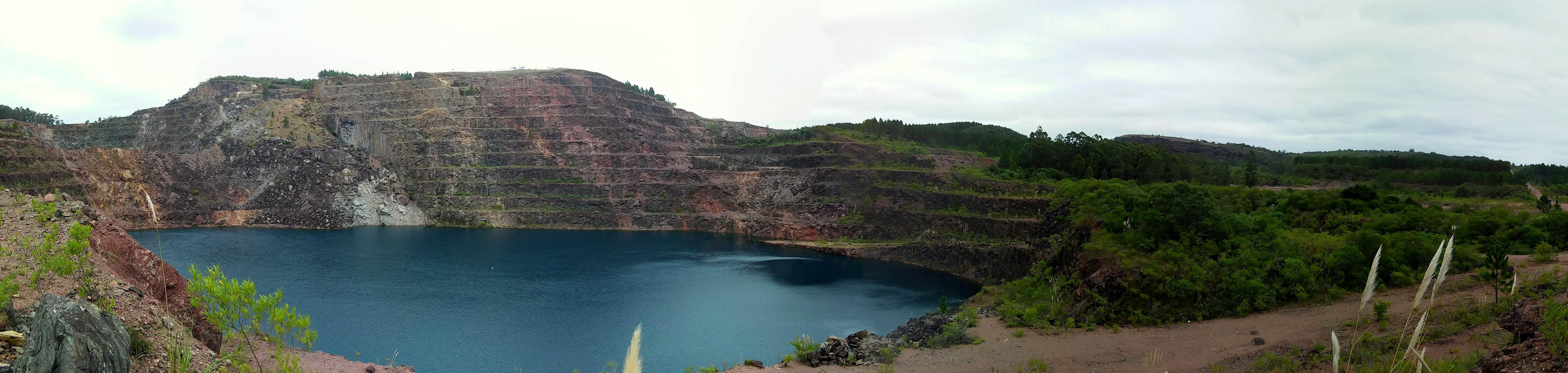 A Mina Uruguai está localizada no distrito de Minas do Camaquã, em Caçapava do Sul. Esta foi a maior mina de cobre do Brasil por dezenas de anos durante o século XIX